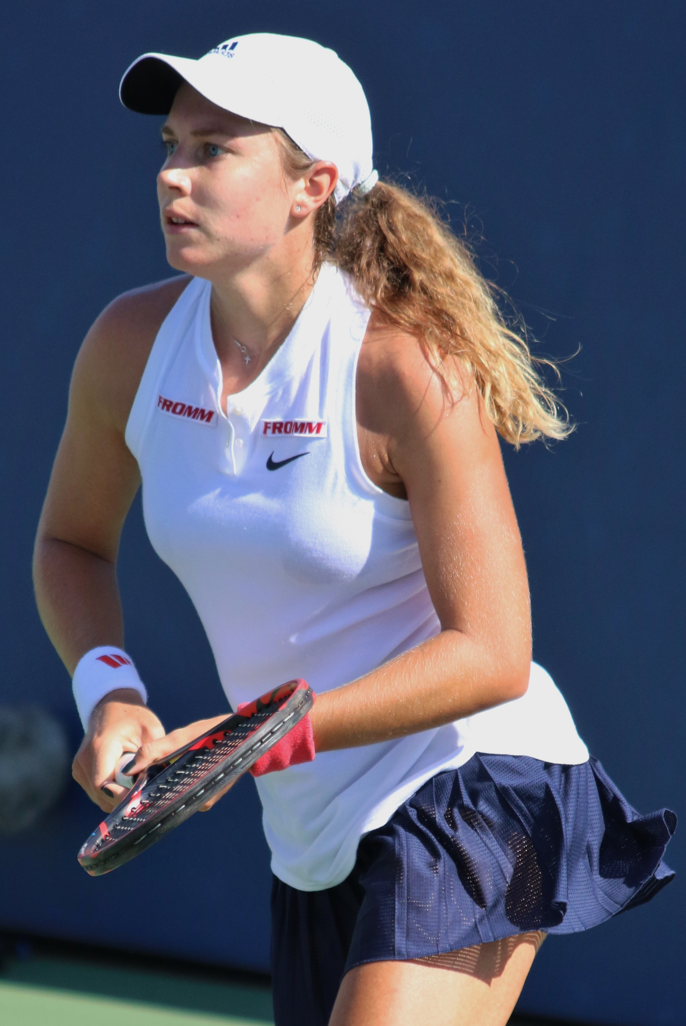 Voegele US16 (36)